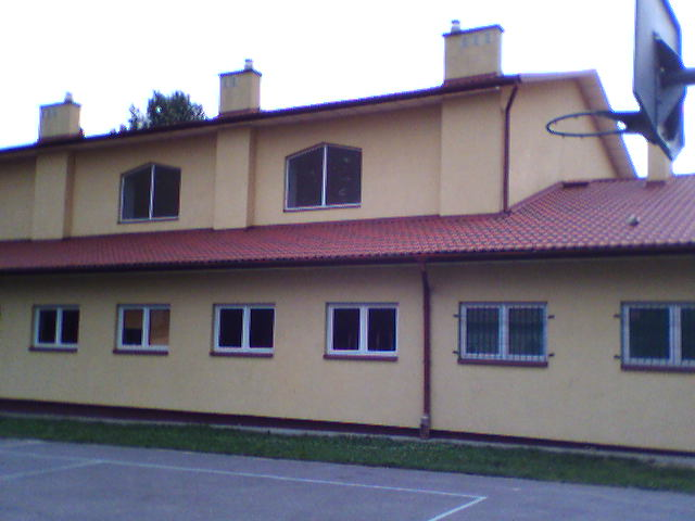 SP2.